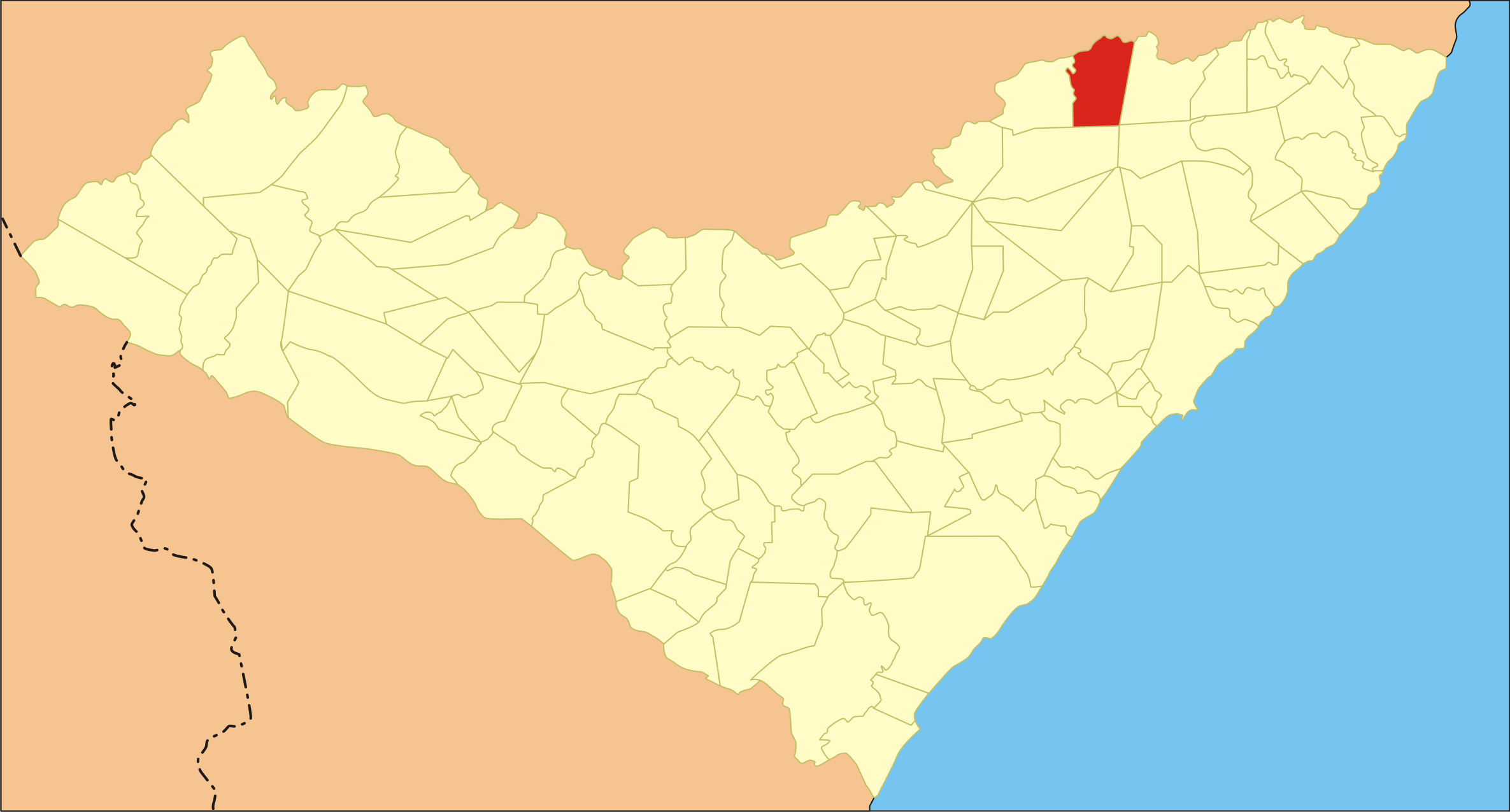 Localização da cidade em Alagoas